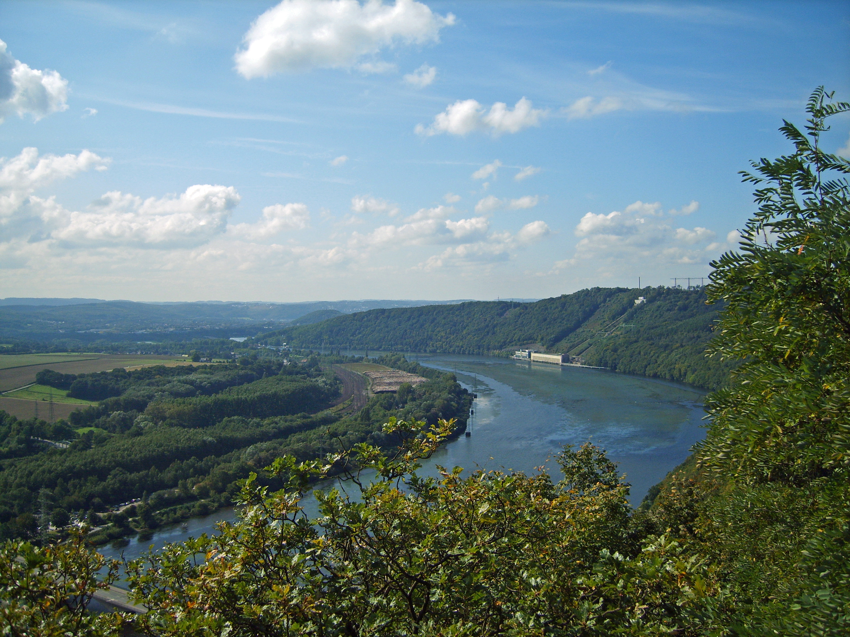 Blick von der Hohensyburg in Dortmund auf den Hengsteysee mit Elodea-Massenbestand; links vom See und den Bahngleisen das Hagener Naturschutzgebiet „Uhlenbruch“ (Waldbereich); rechts am See das Koepchenwerk